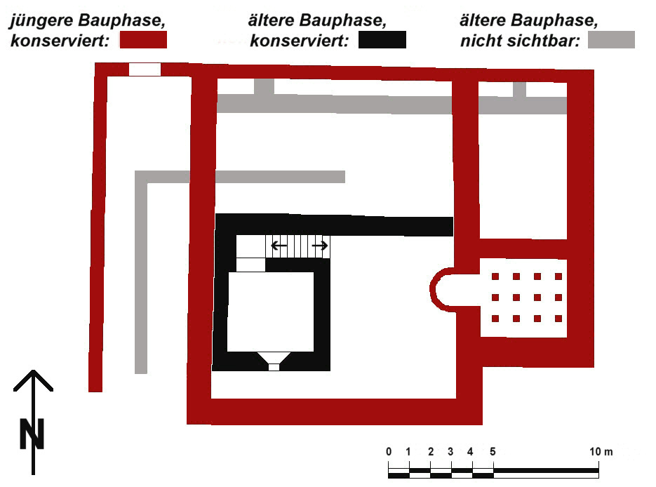 Grundriss des Hauptgebäudes der Villa Rustica von Wiesenbach (Baden)